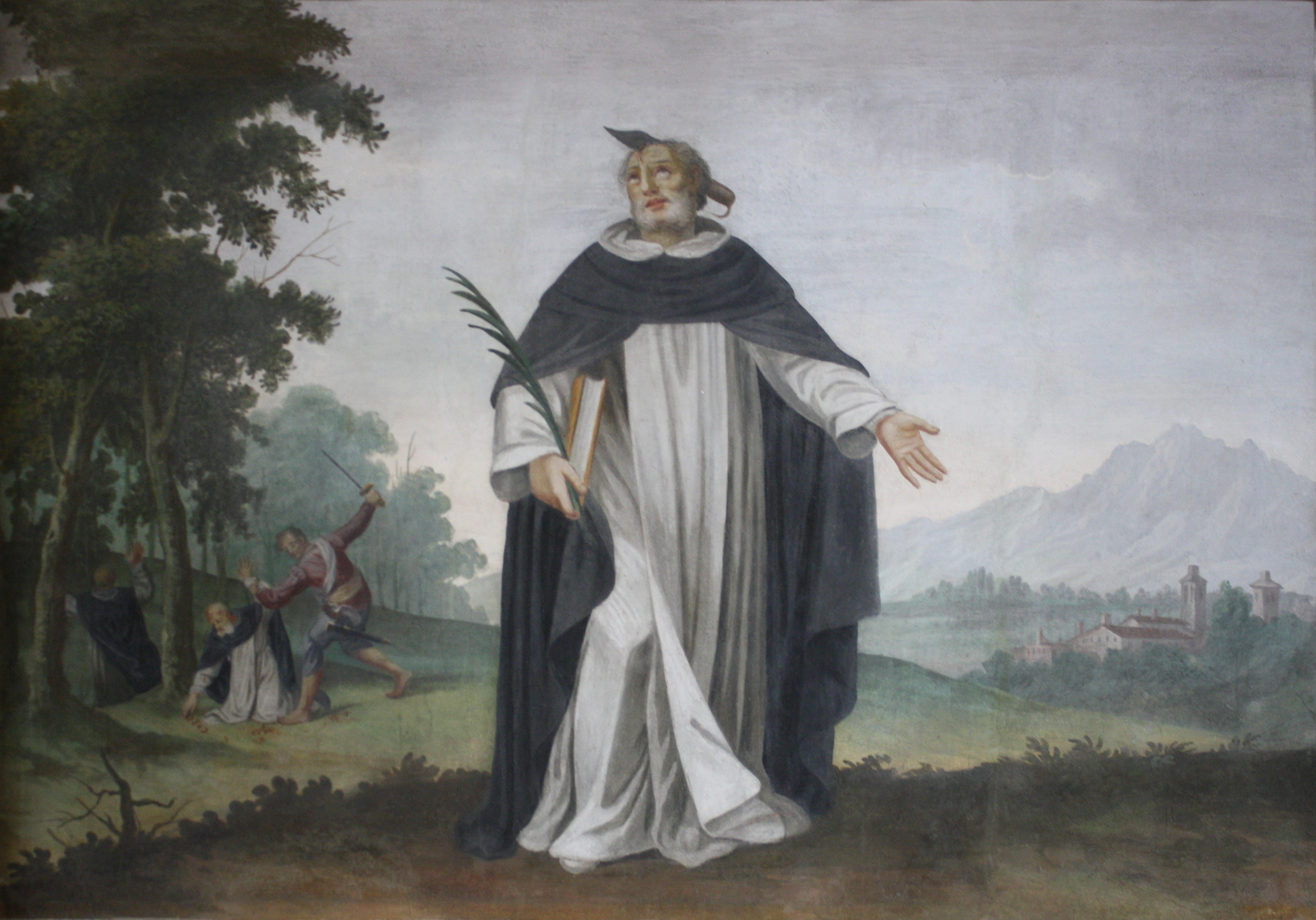 L'interno della basilica di San Magno a Legnano - Cappella di S. Pietro Martire - Affresco del 1830 di Beniamino Turri che raffigura San Pietro Martire. Sullo sfondo è rappresentata la scena del martirio.